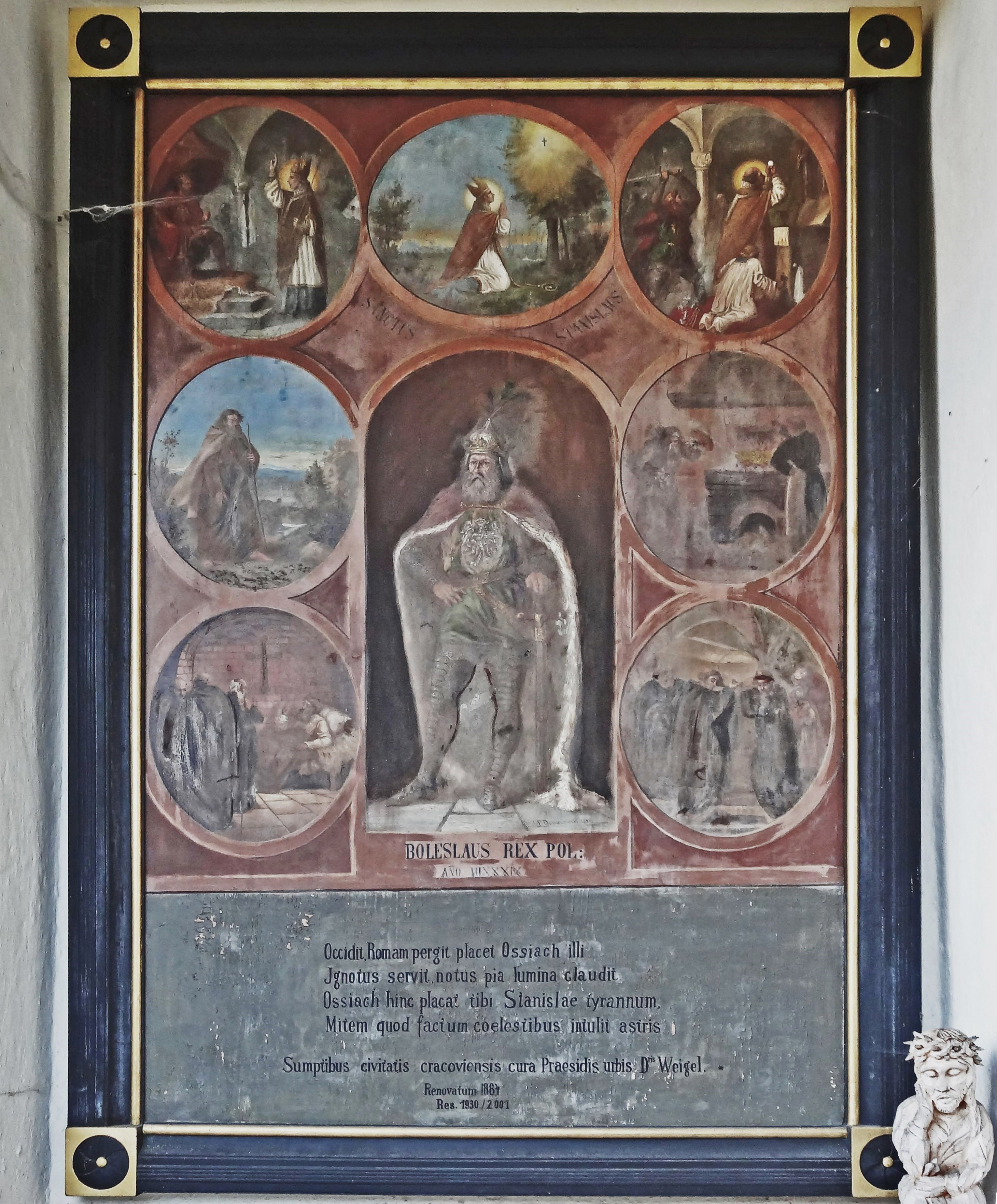 Stift Ossiach, gemaltes Epitaph für König Boleslaus II.